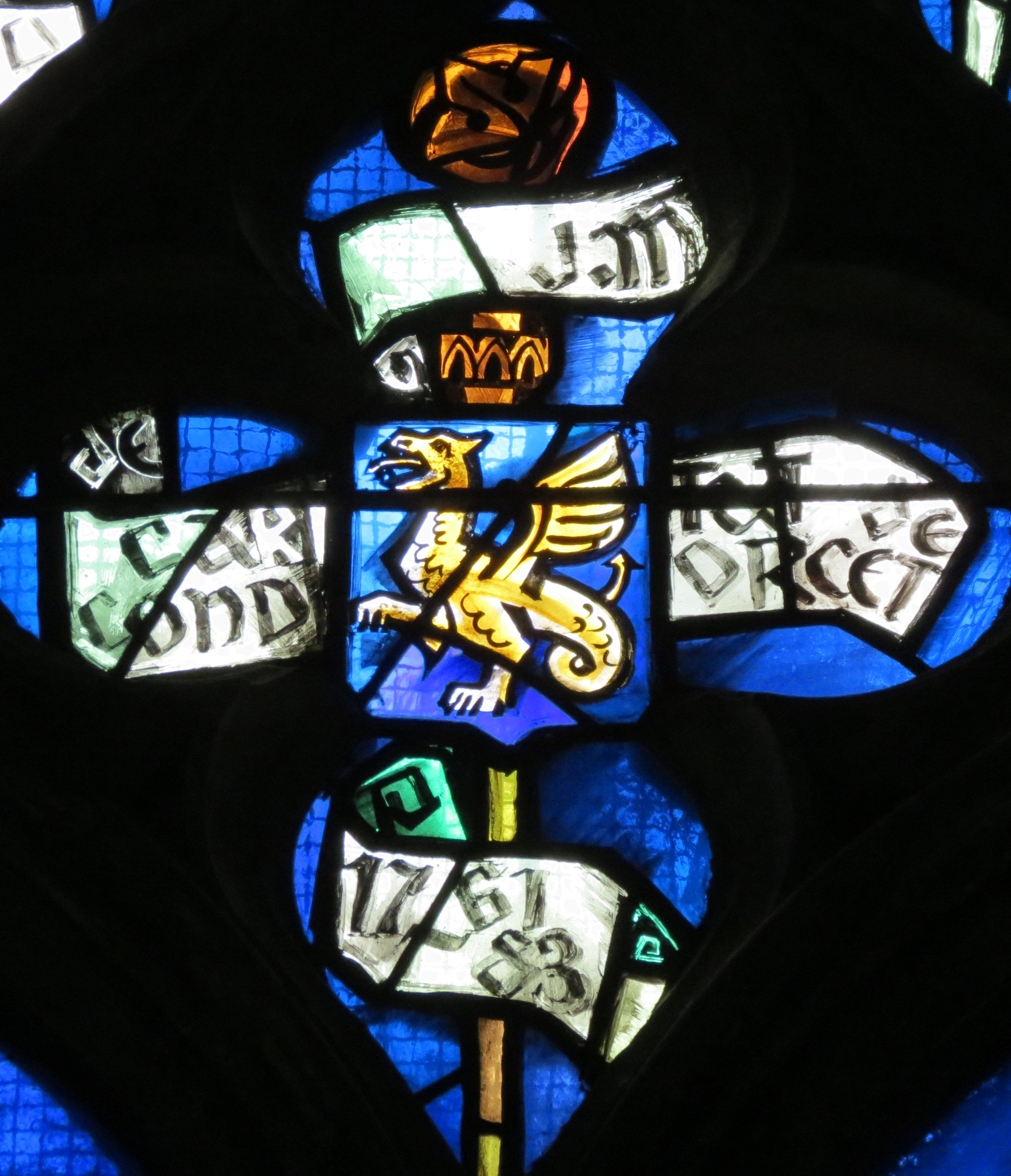 Blason de Jacques-Marie de Caritat de Condorcet, évêque de Lisieux (1761-1783).